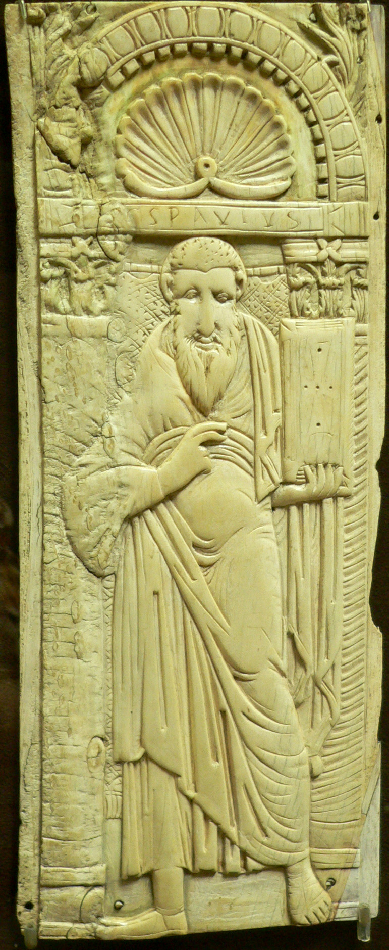 Plaque Saint Paul Orient byzantin VIe-début VIIe siècle. Ivoire Musée National du Moyen-Âge (Cluny), Cl. 13074 Autre vue : Saint Paul, détail